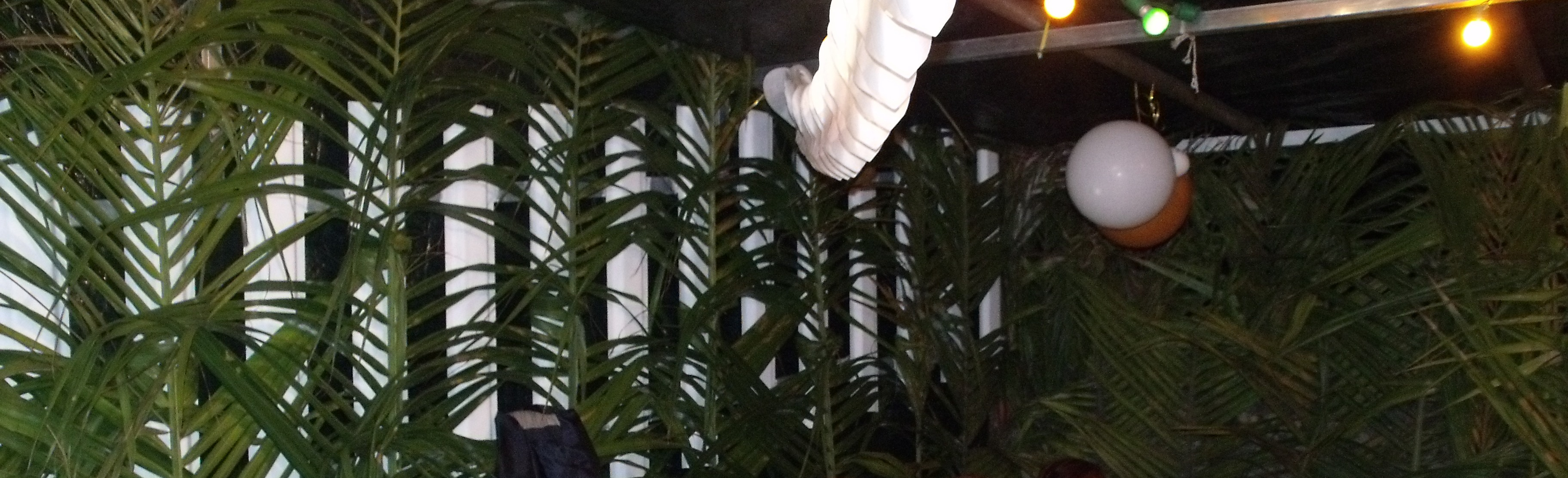 Les feuilles de cocotiers décorent la salle et sont représentatifs de l'île.